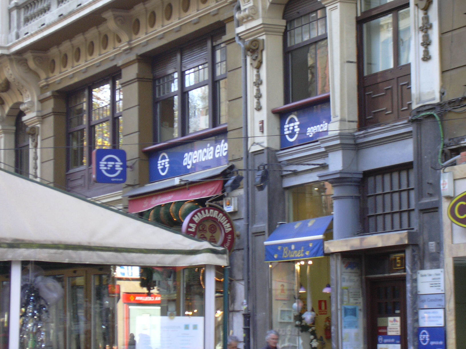 Filial da agência de notícias EFE na cidade espanhola de Oviedo, ao lado de sua catedral